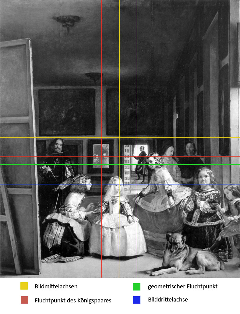 Diego Velázquez, Las Menias, Schema